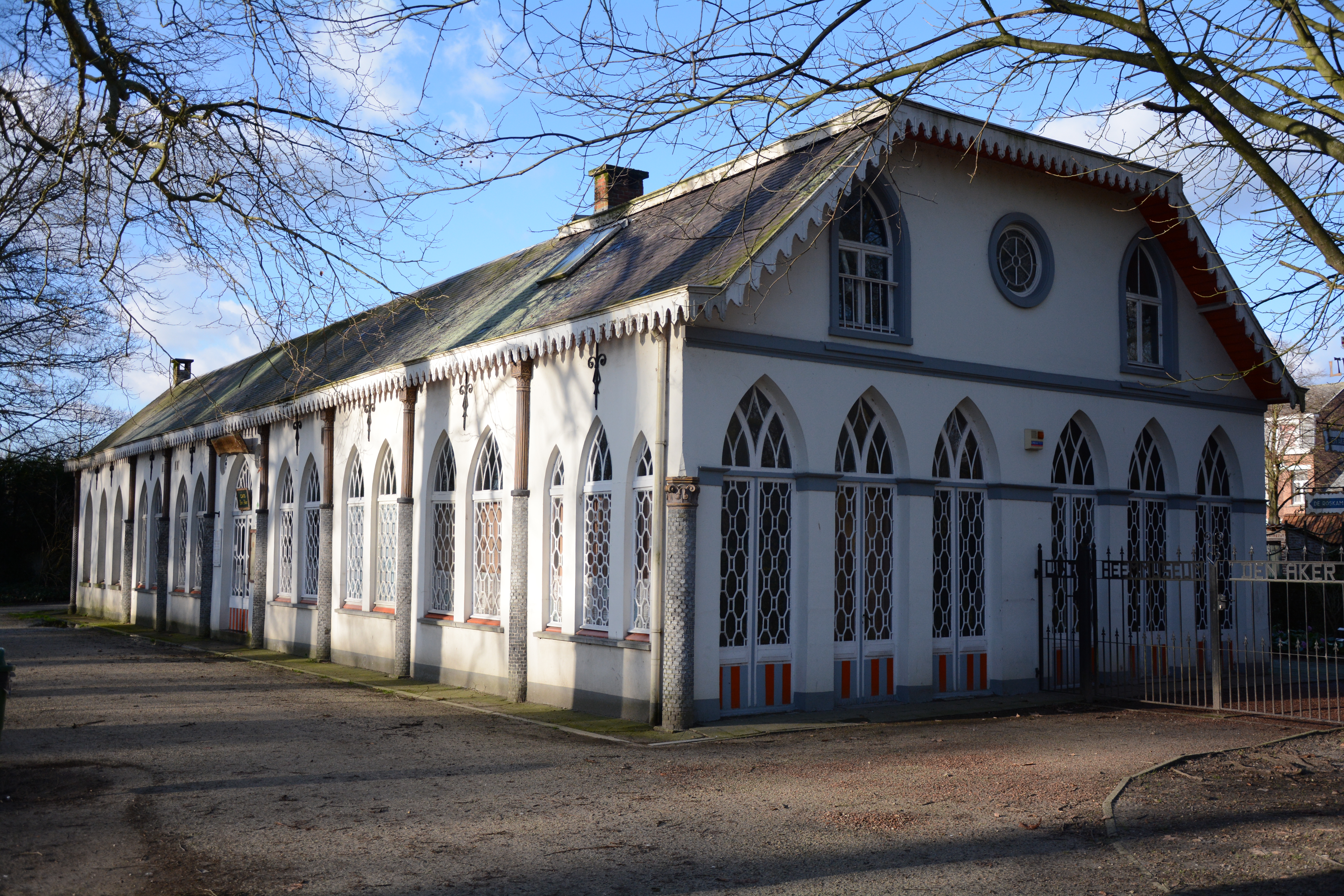 Oranjerie, Kasteel Lindenhof, Koning Albertstraat 41, Lint